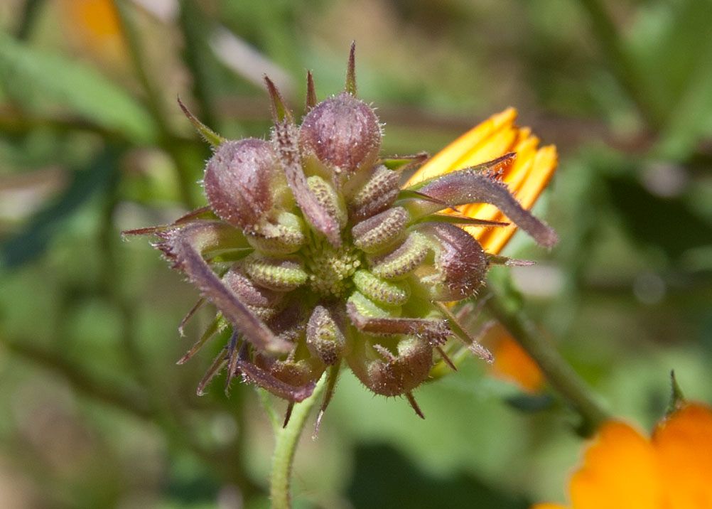 Calendula suffruticosa fruit